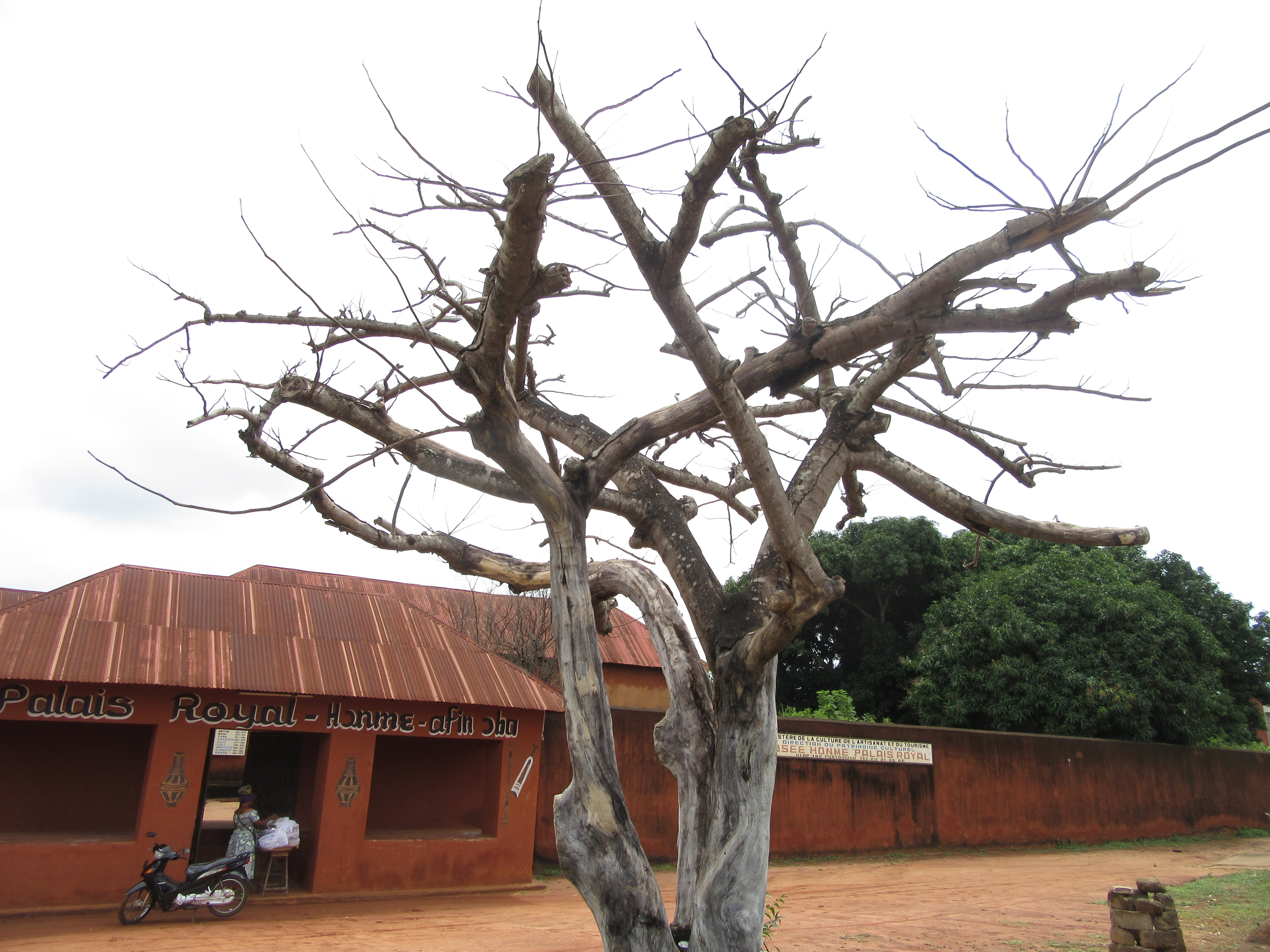 Musée Honmè La plupart des rois de Porto-Novo ont habité ce palais car, à la différence des rois d'Abomey, ils ne marquaient pas leur règne par des constructions nouvelles. Abandonné en 1976 à la suite de querelles de succession, il a fait l'objet d'importants travaux de restauration et est ouvert au public depuis 1988, à l'exception d'une partie réservée aux descendants des chefs supérieurs. On ne parle plus en effet de rois, mais de " chefs supérieurs " depuis qu'avec la colonisation les rois de Porto-Novo ont été dépossédés de leur pouvoir politique. La résidence royale est implantée sur un site de 2,5 ha. Les bâtiments, construits pour la plupart au XIXe siècle, sont distribués autour de cinq cours, dont deux à impluvium, comme dans les palais d'Ifé et de Kétou, tandis qu'à l'extérieur se trouvent les temples et les autels célébrant la mémoire des ancêtres de la famille royale. La visite mérite un détour même si l'ancien Palais Royal présente moins d'intérêt que celui d'Abomey. Wikidata has entry Q2784858 with data related to this item.